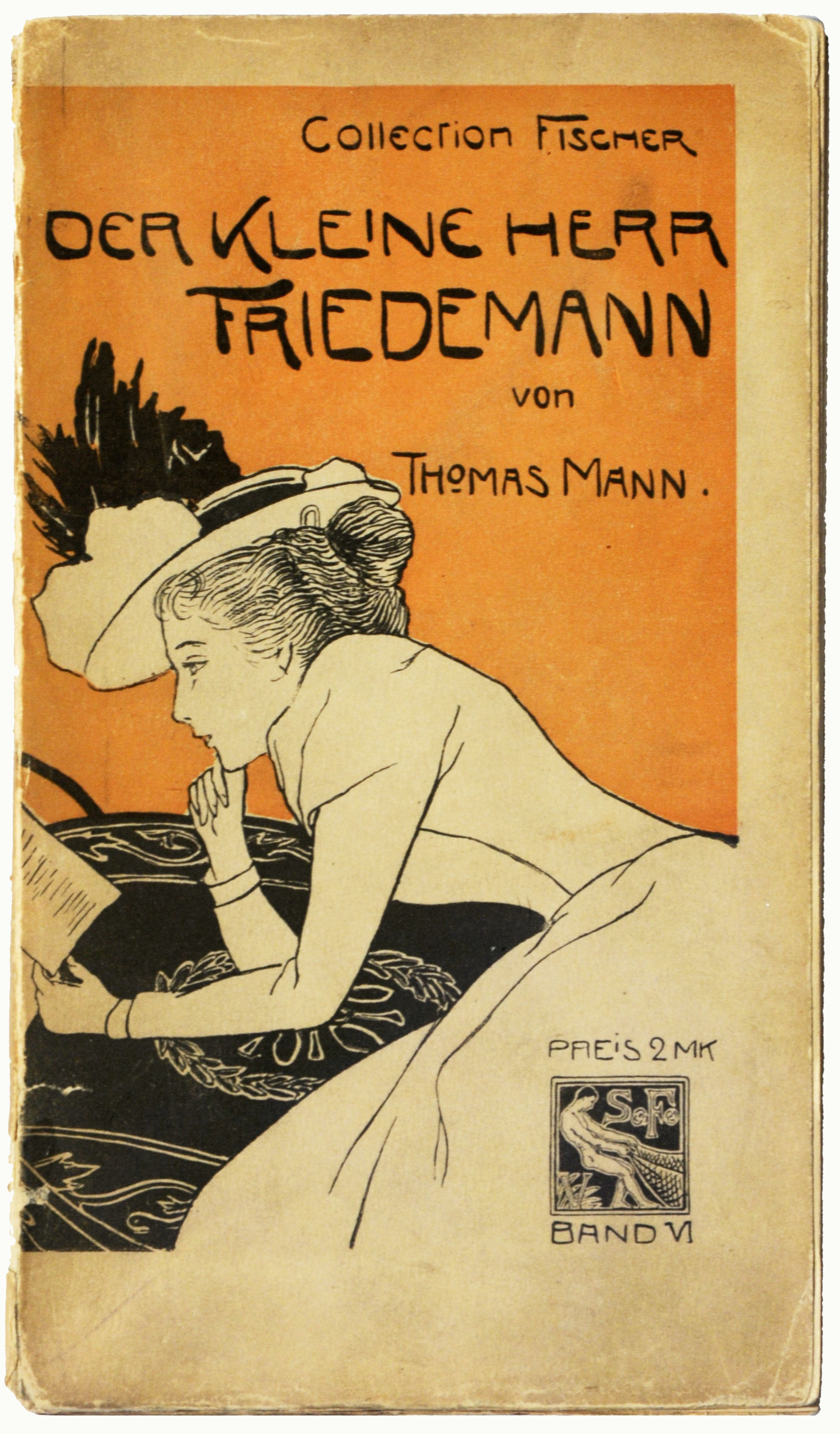 Thomas Mann: Der kleine Herr Friedemann. Novellen. [1] Berlin: S. Fischer 1898, 198 Seiten. Erstausgabe (Potempa B 1 [2], Bürgin I.1, Wilpert/Gühring² 2) Orig.- Karton 19 x 11 cm. Illustration: Baptist Scherer.